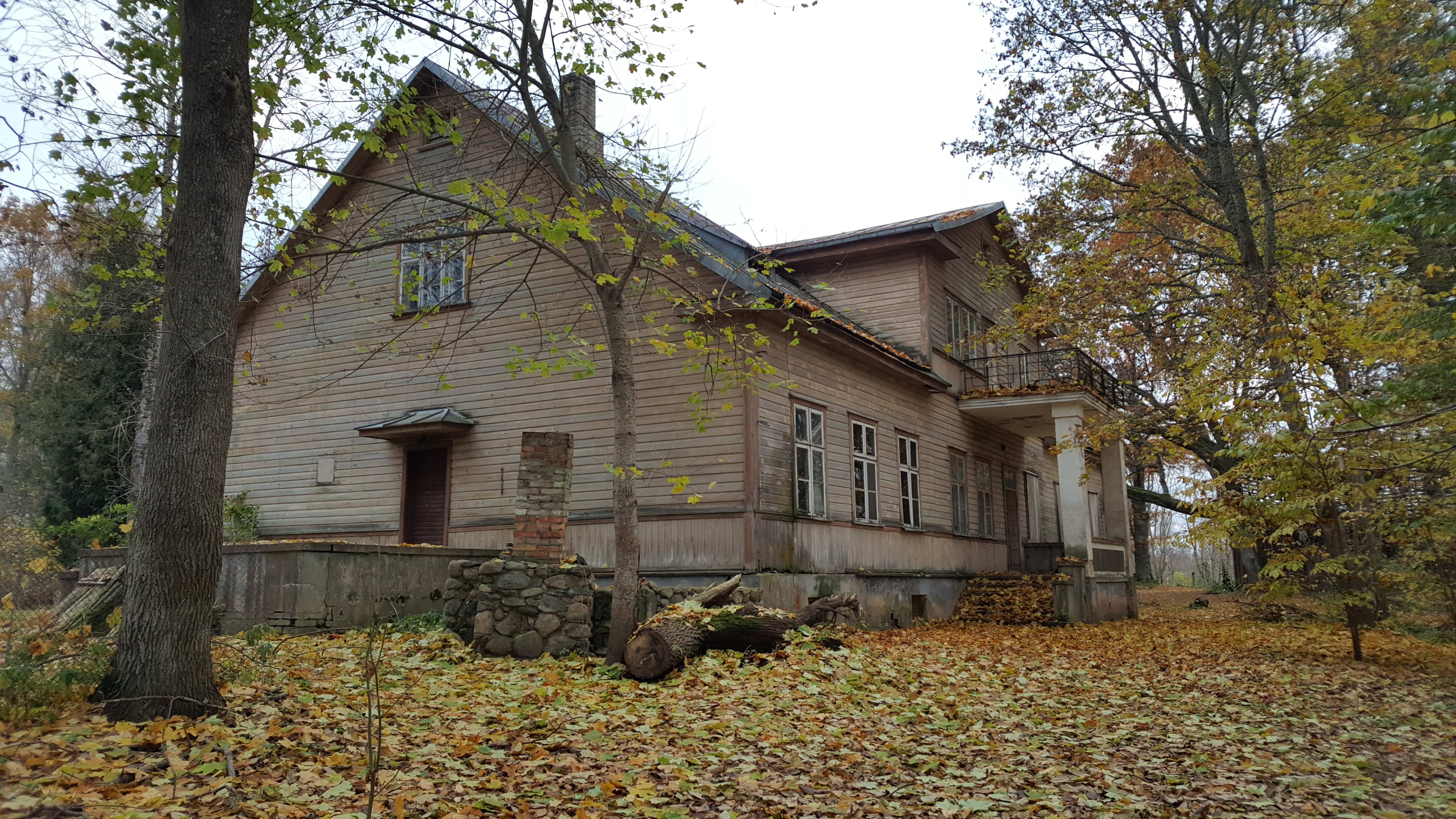 Kriimani mõisa peahoone tagakülg 2017. aastal